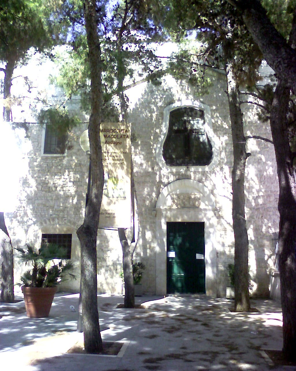 cchiesa dell'immacolata-Modugno (bari)-italy